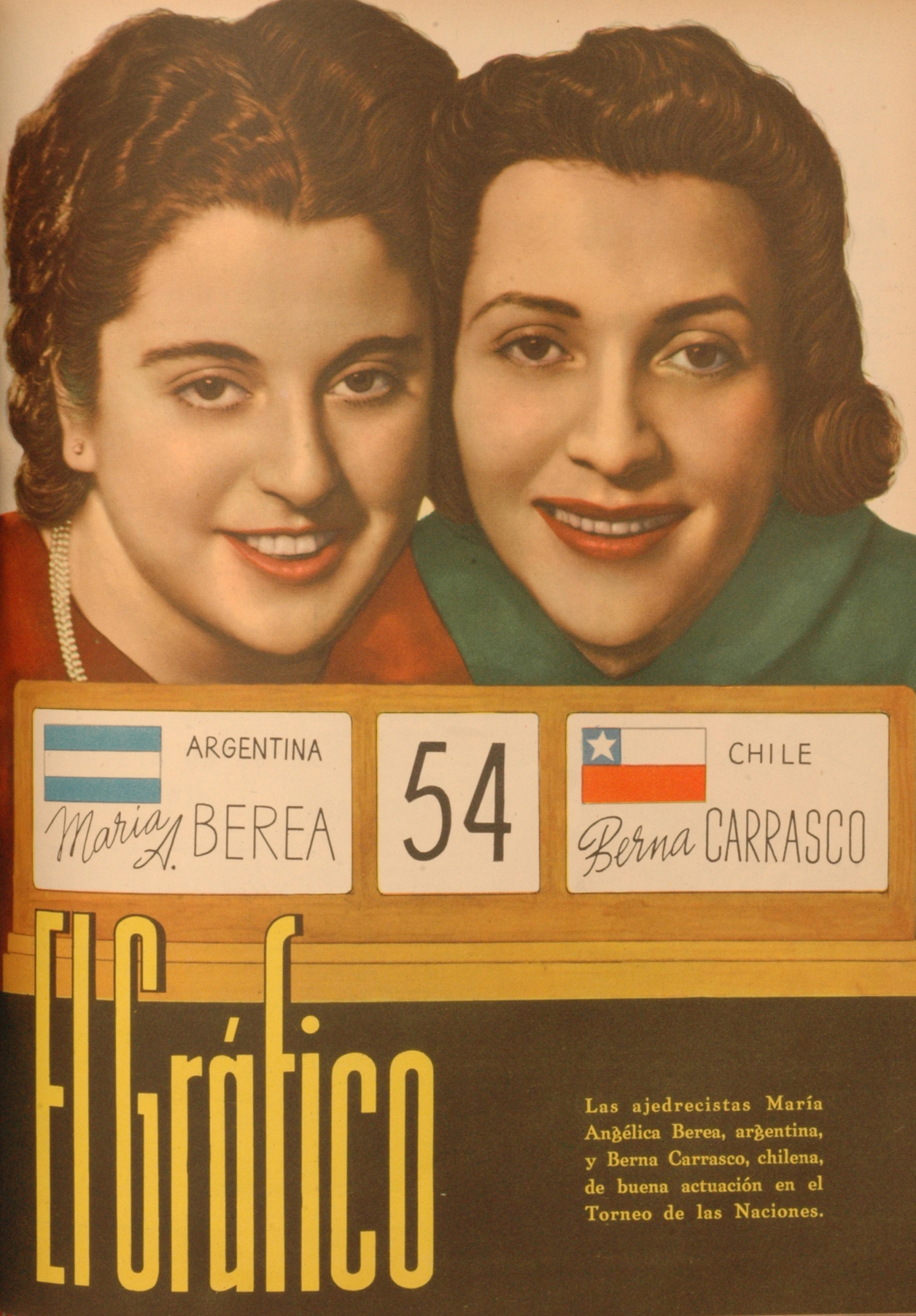 El Grafico del 15 de Septiembre de 1939. Edicion 1053